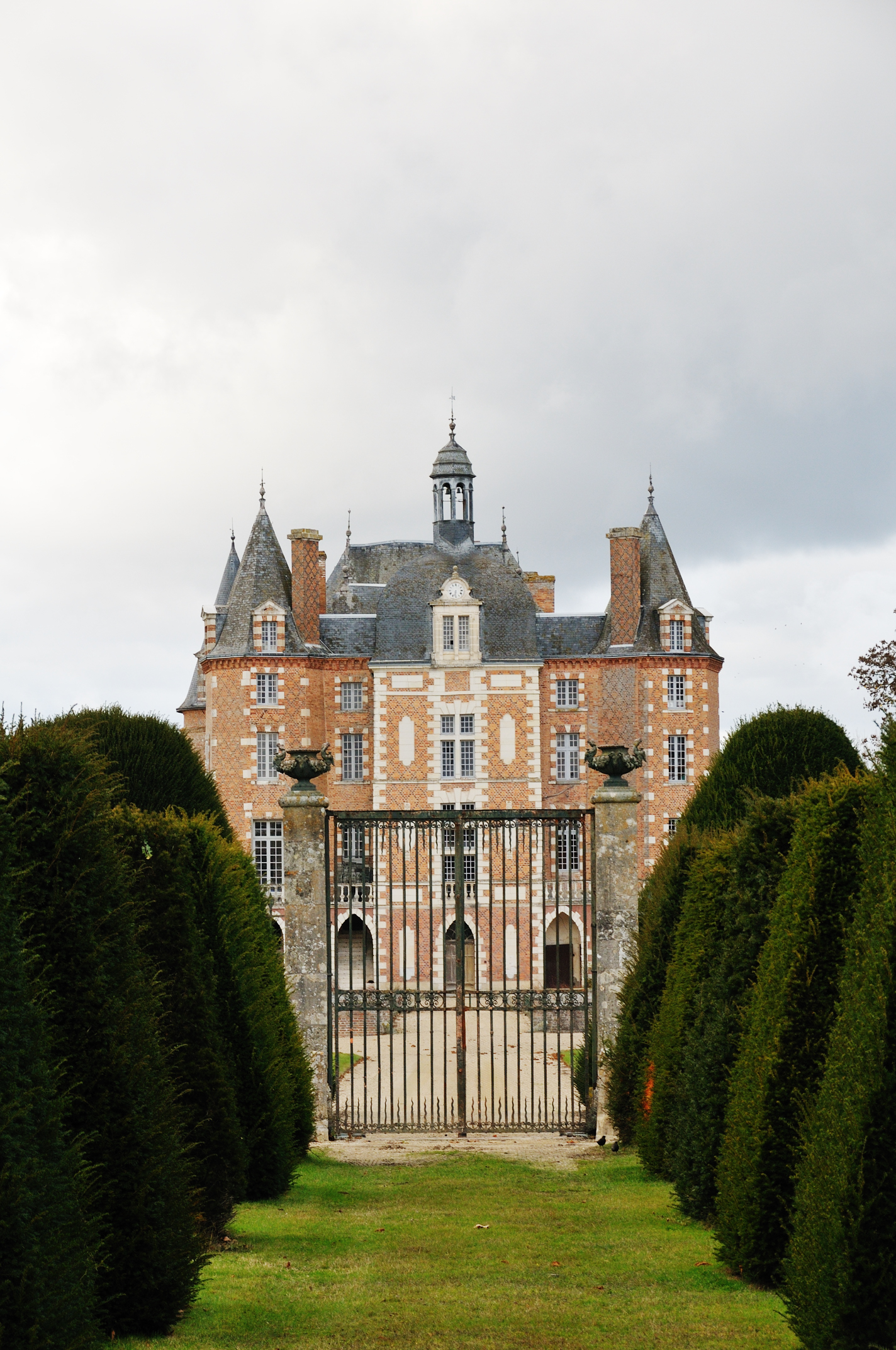 Château de La Ferté-Imbault, Loir-et-Cher, France